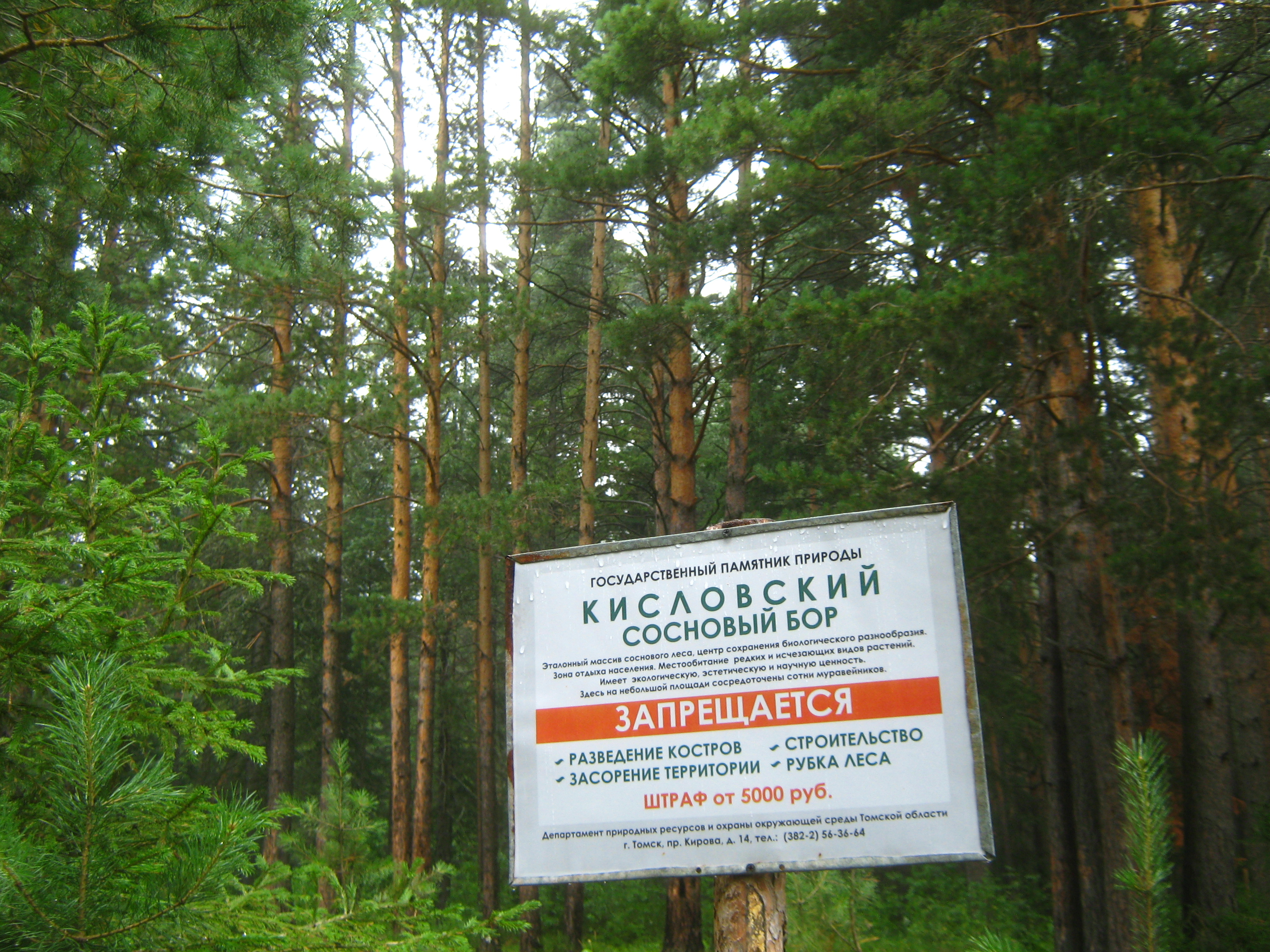 Кисловский бор недалеко от реки Кисловка и деревни Кисловка This image is related to the protected area of Russia number 7010255